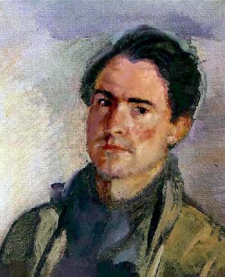 Self-portrait